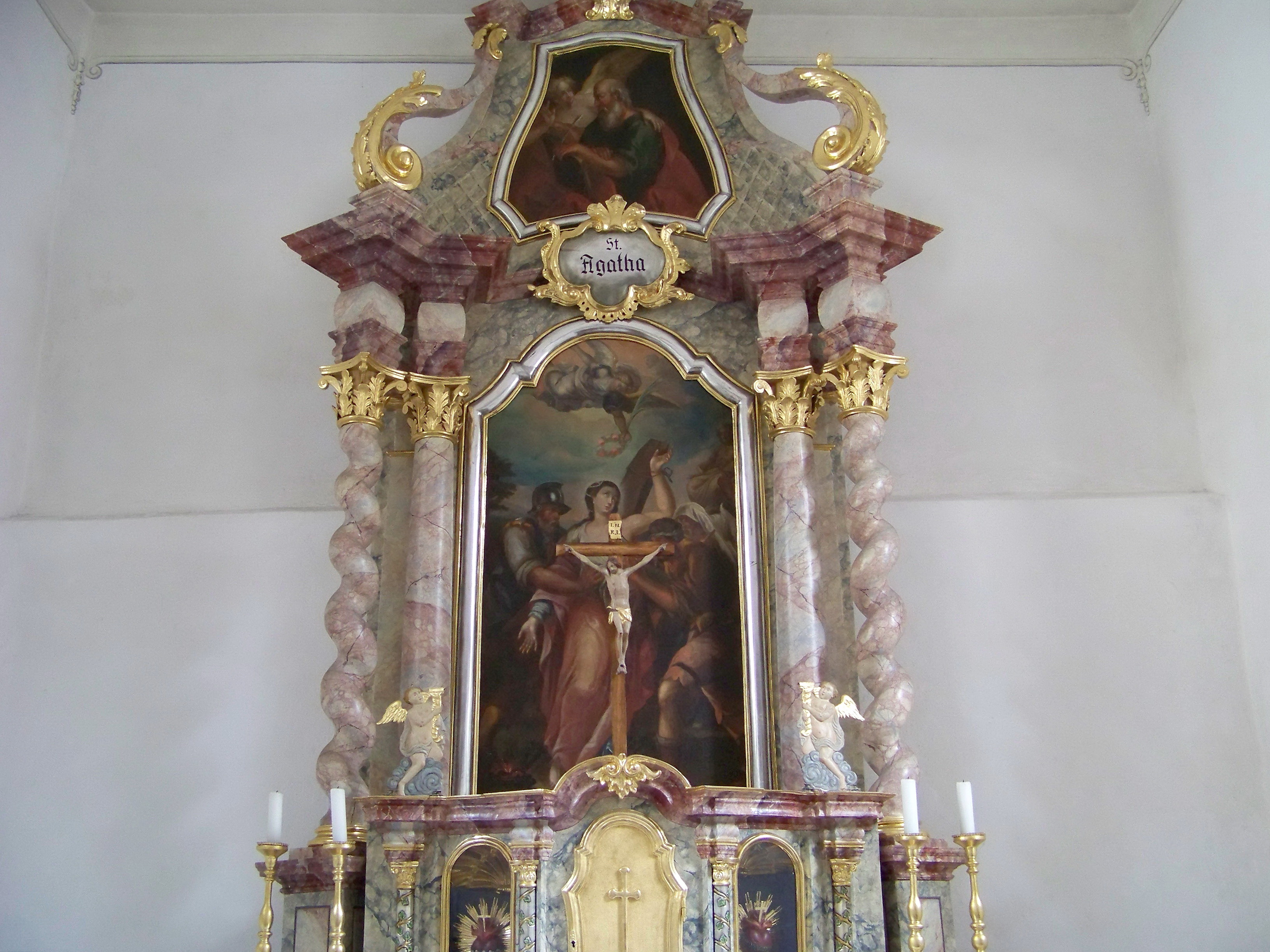 Ergoldsbach, Friedhofstraße 29. Katholische Kapelle St. Agatha. Im Kern mittelalterlicher Bau, 1726 barockisiert. Hochaltar um 1725. Ein glattes und ein gewundenes Säulenpaar. Aufzug mit Voluten. Altarblatt St. Agatha. Aufzugsgemälde Evangelist St. Matthäus.